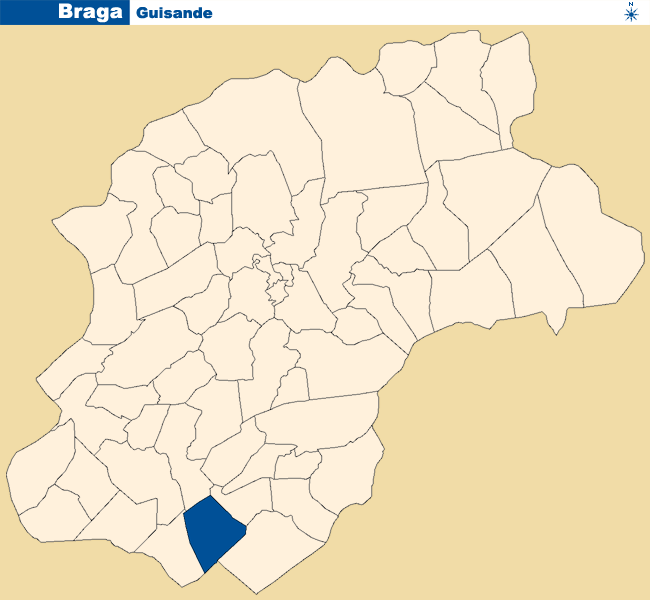 Localização de Guisande no concelho de Braga.